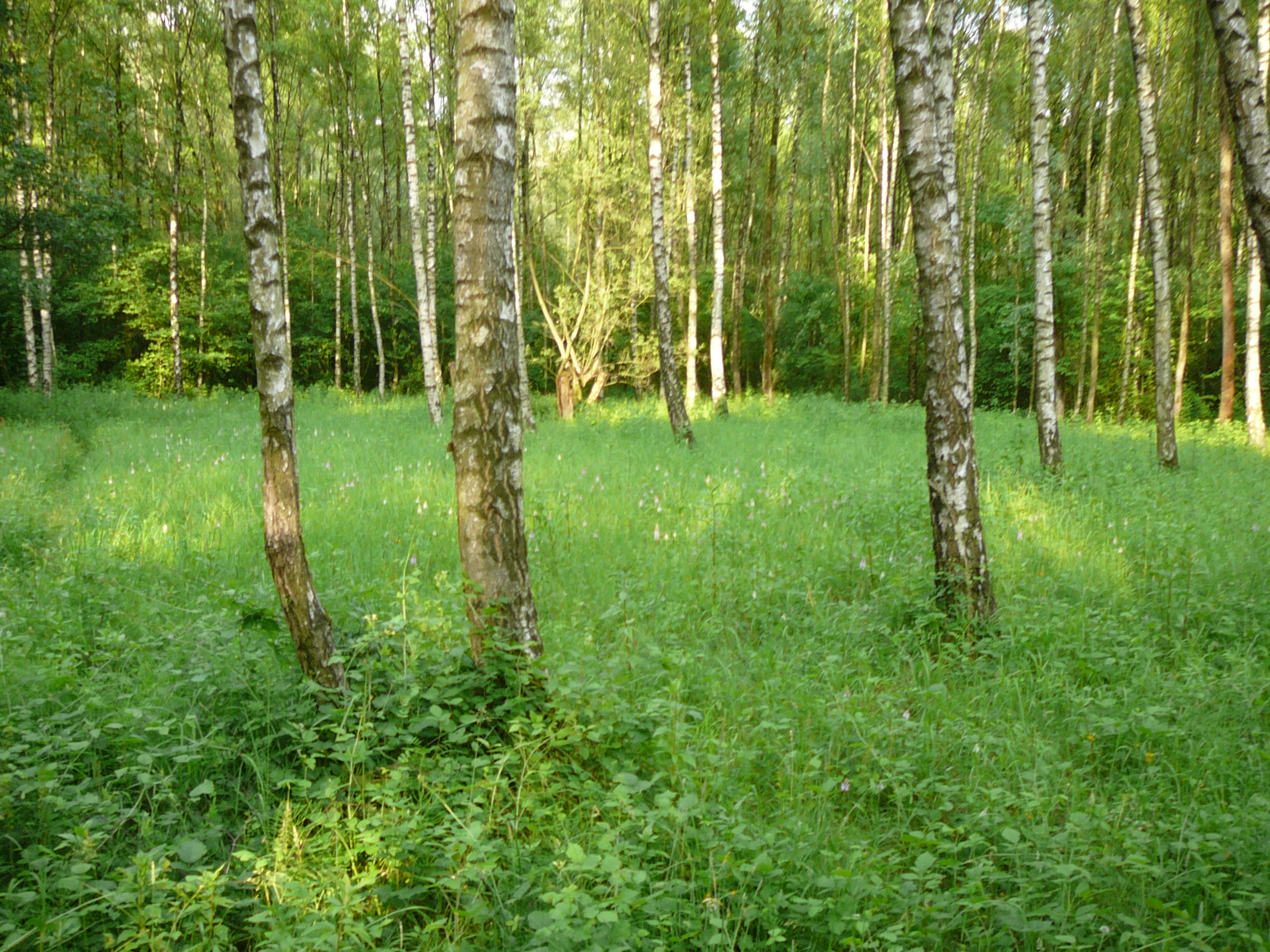 Grube 7, Haan-Gruiten